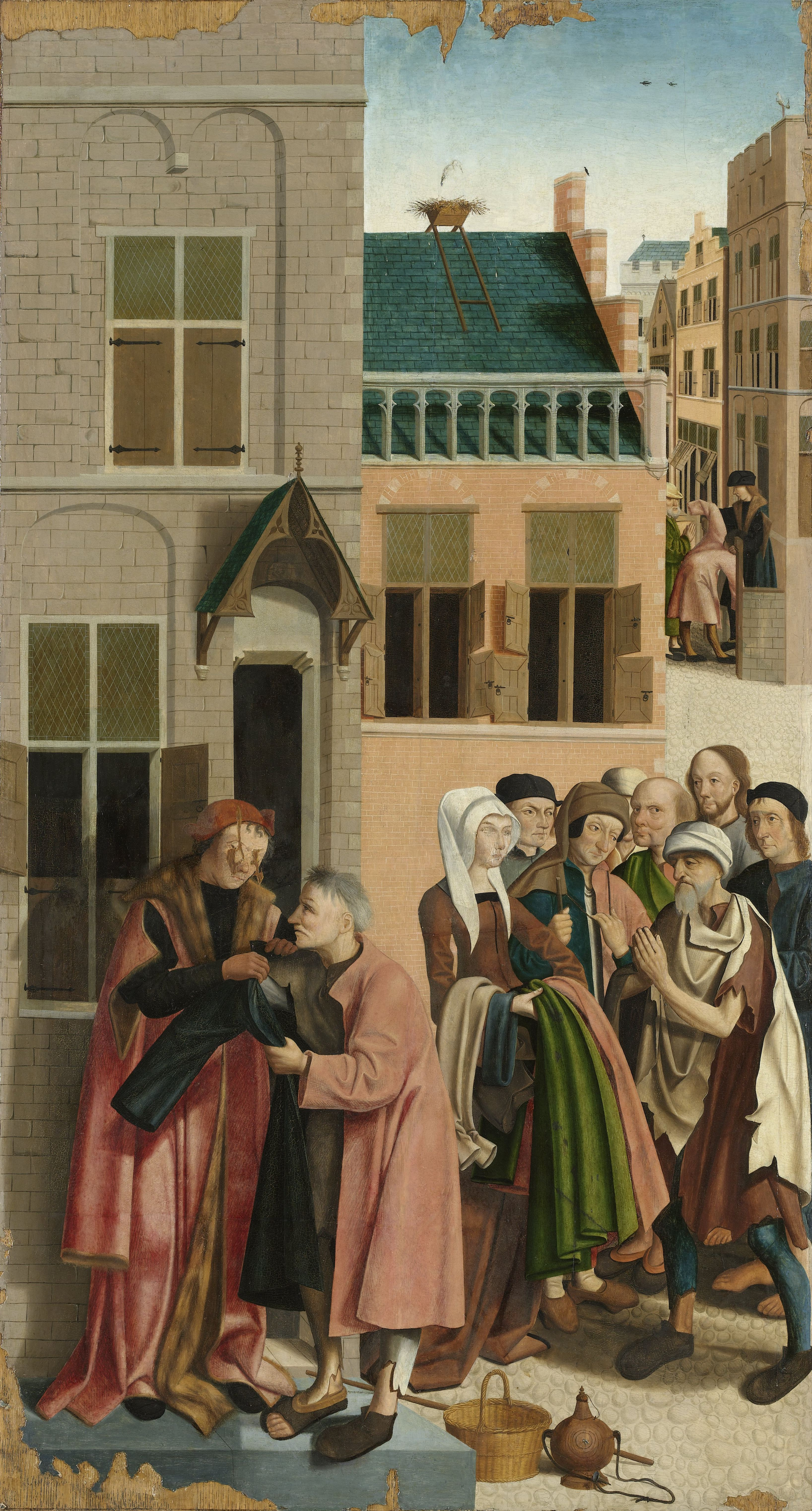 De zeven werken van barmhartigheid. 3: Het kleden van de naakten. Een man een een vrouw delen kleding uit aan armen en bedelaars die voor hun huis staan. Tussen de armen staat Christus. Op de achtergrond deelt een man kleding uit. Onderdeel van een reeks van zeven schilderijen met voorstellingen van de zeven werken van barmhartigheid.; Meester van Alkmaar (werkzaam 1490–1510), Alkmaar, 1504, olieverf op paneel